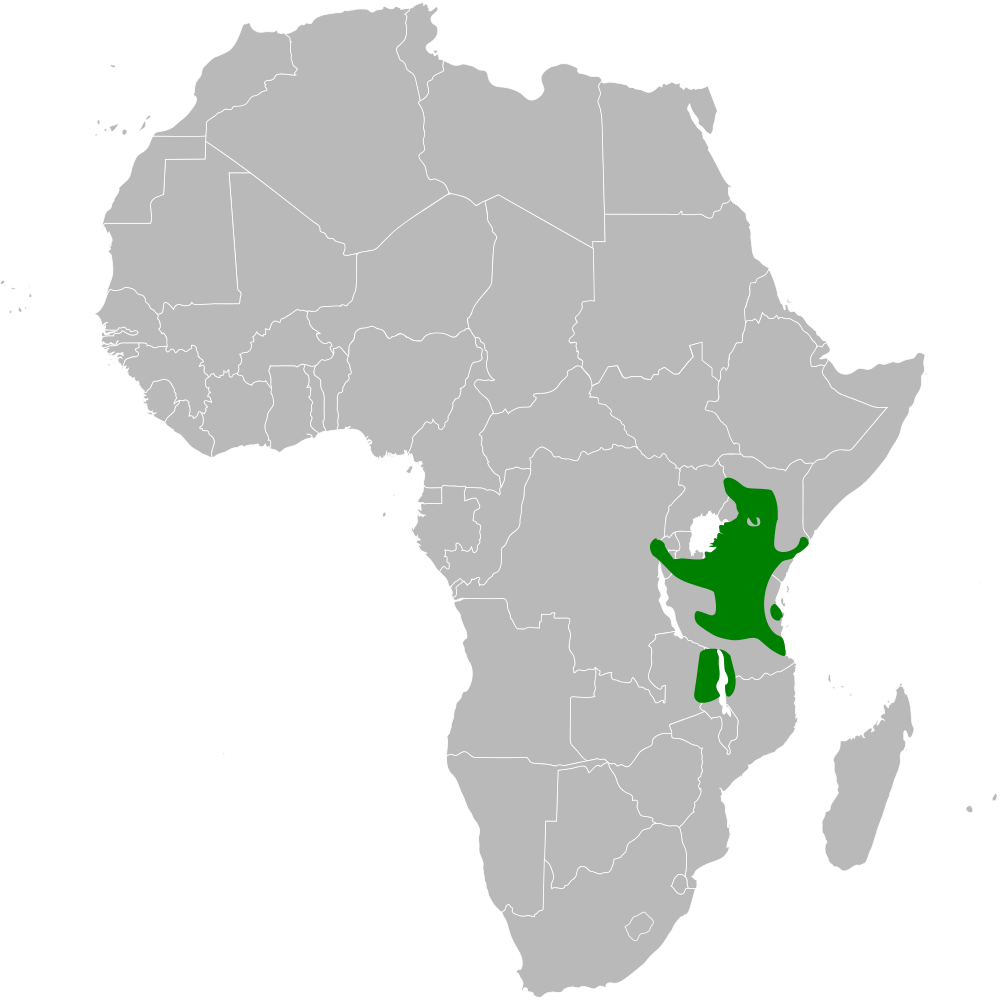 Eremopterix leucopareia distribution map, based on